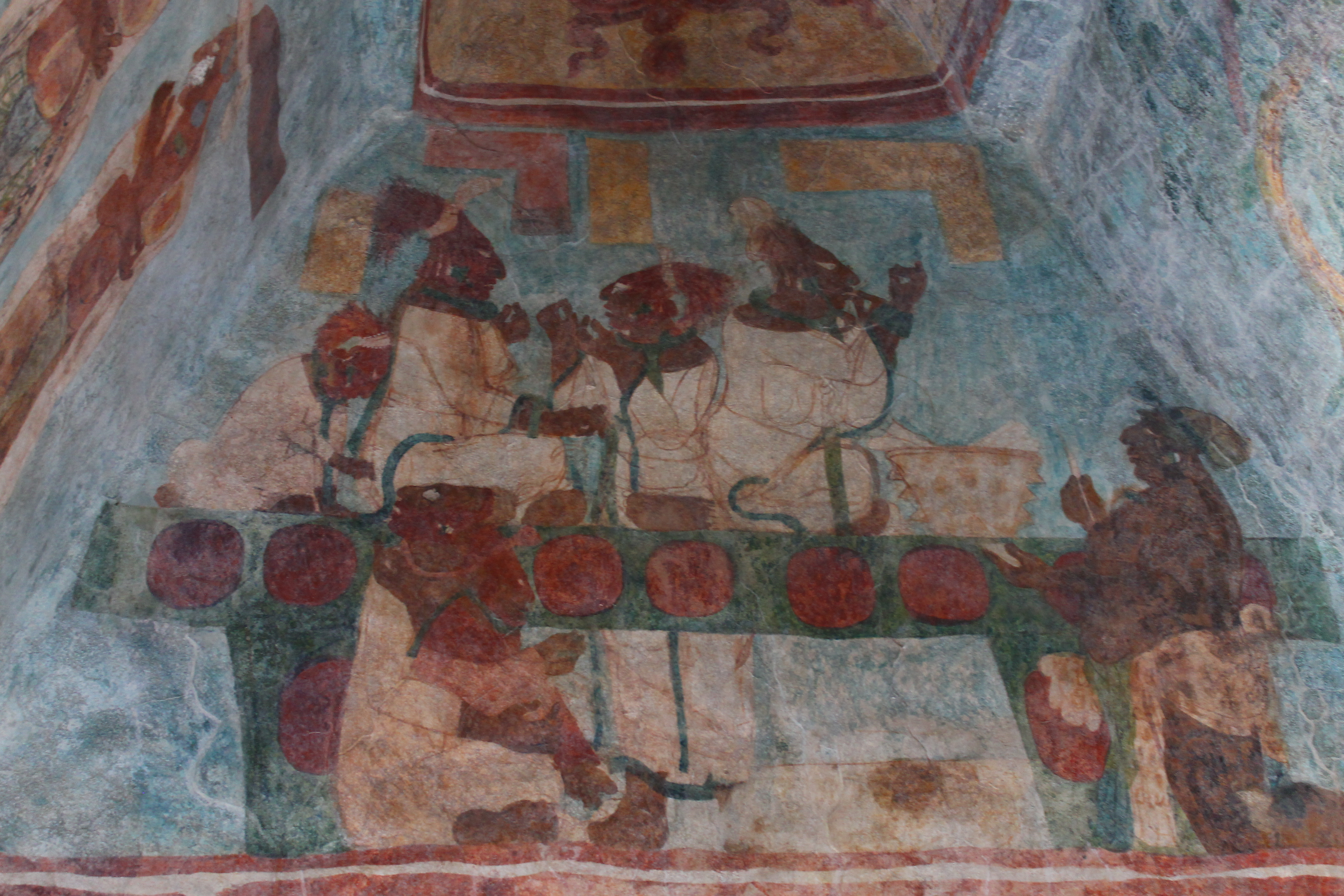 Pinturas ancestrales en mítica zona arqueológica de Bonampak, Chiapas.